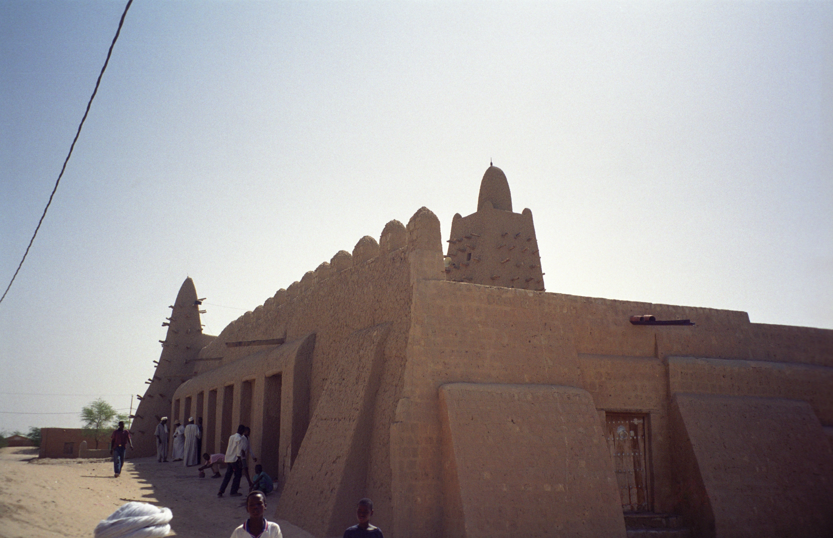 Djinguereber Mosque, Timbuktu